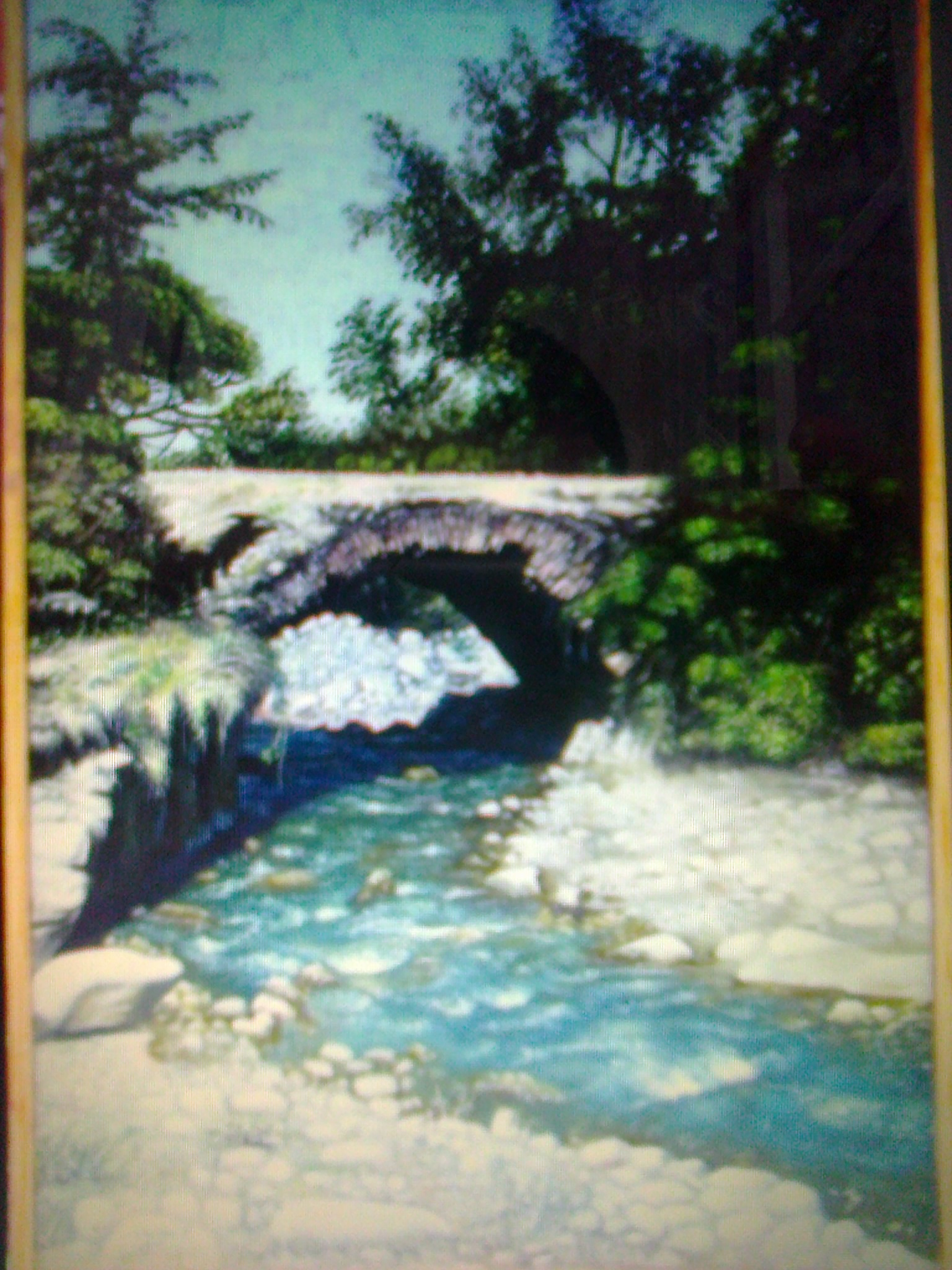 Nəsir Əzimovun əl işi.